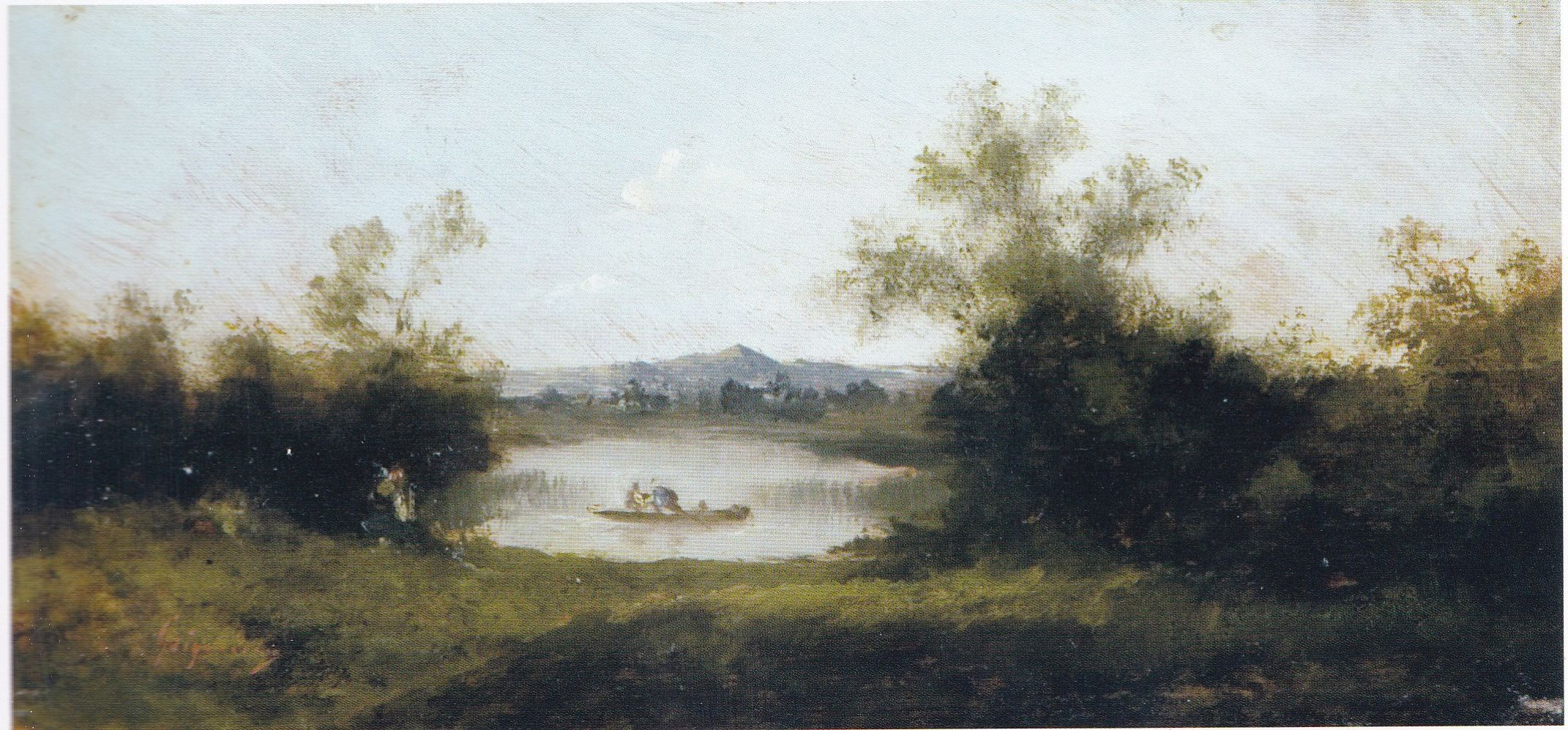 Peisaj cu lac, ulei pe lemn - Galeria de Artă Românească a Muzeului Național de Artă al României.